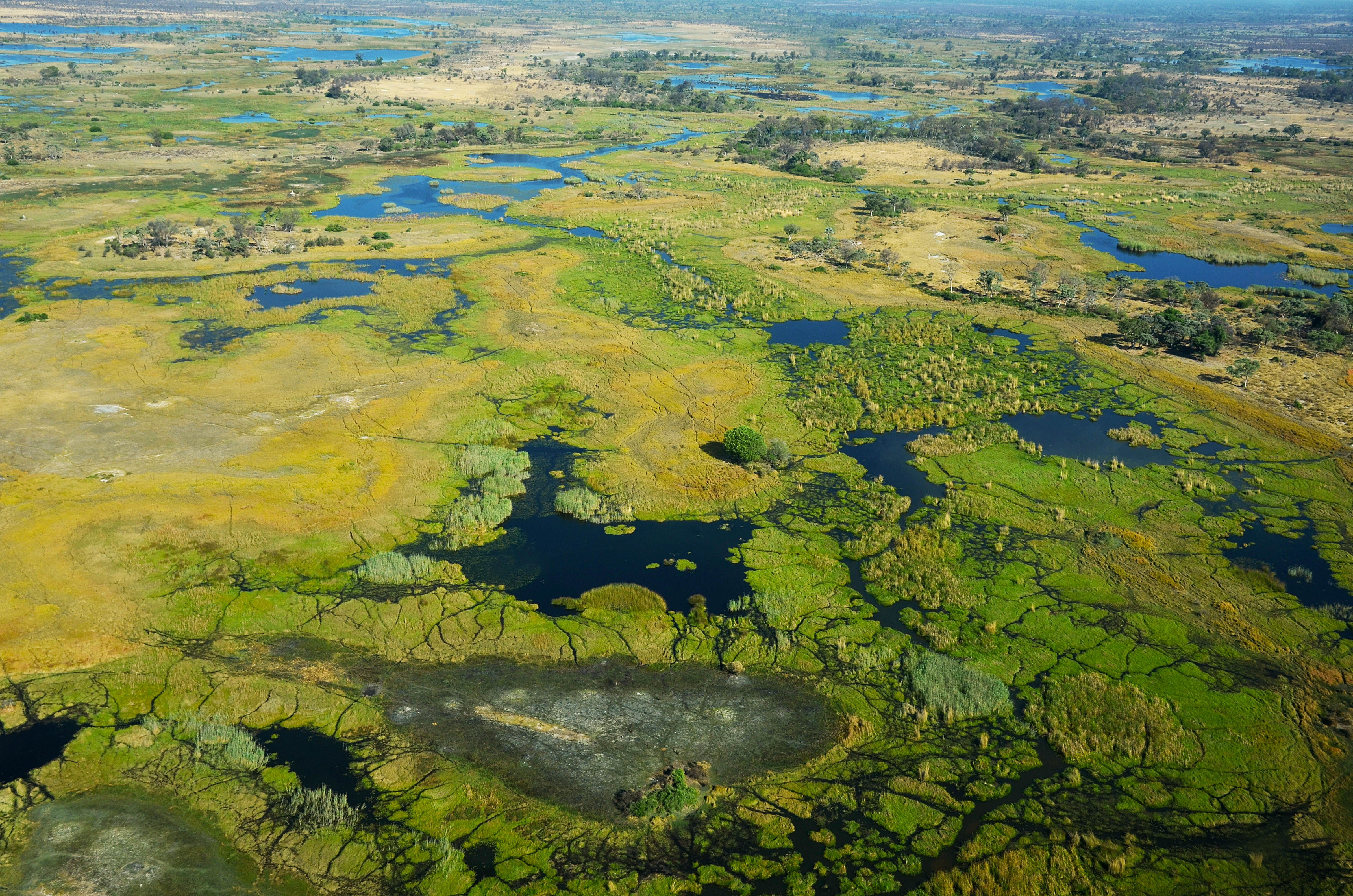 Okavango delta - Botswana